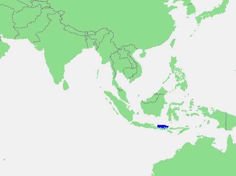 Bali Sea